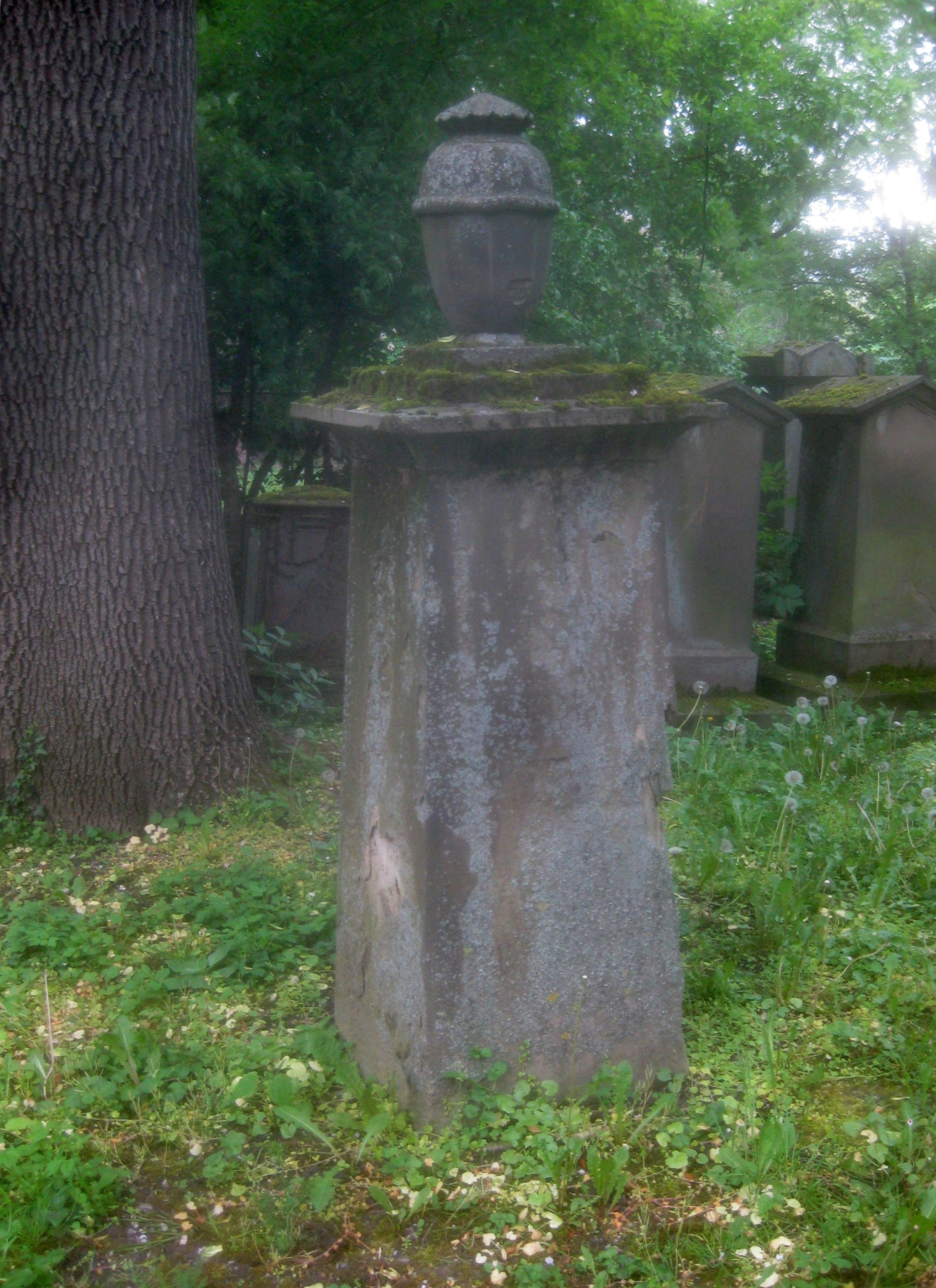 Stuttgart, Hoppenlaufriedhof, Grabmal von Anna Maria Helena von Pallandt.